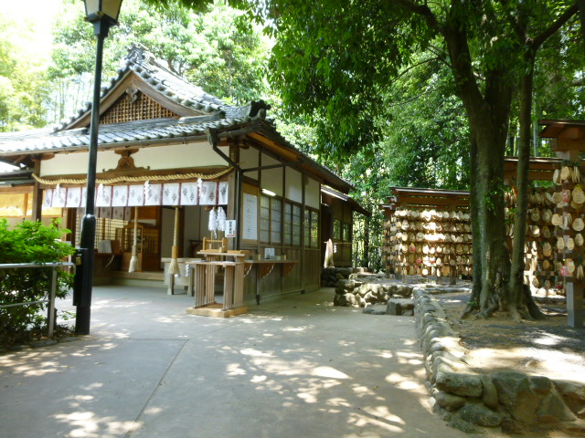 フクロウ型の絵馬（久延彦社）